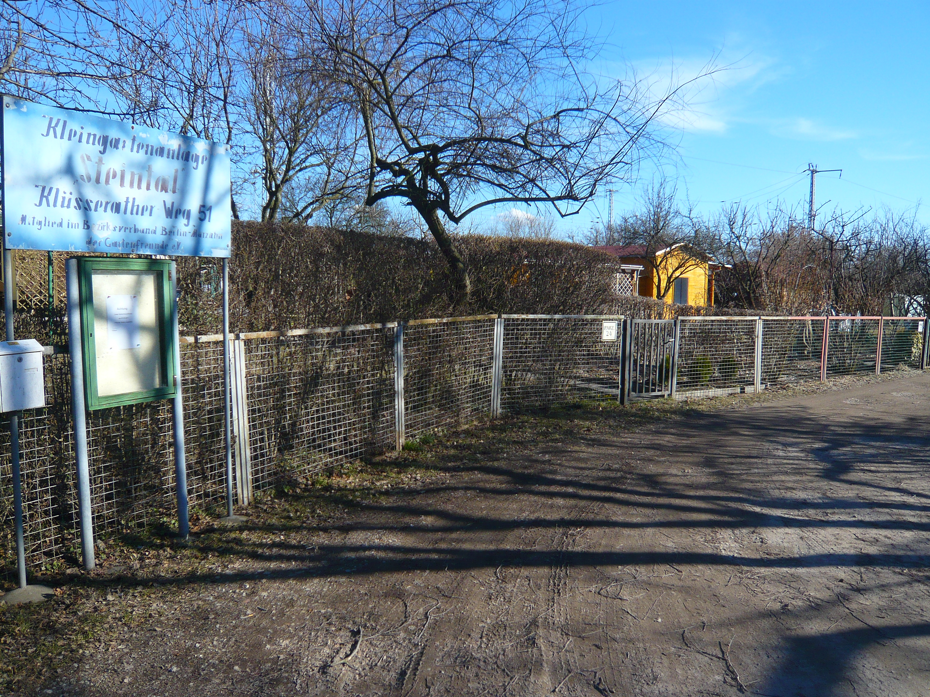 Ortsteil Berlin-Marzahn, KGA "Steintal" am Klüsserather Weg